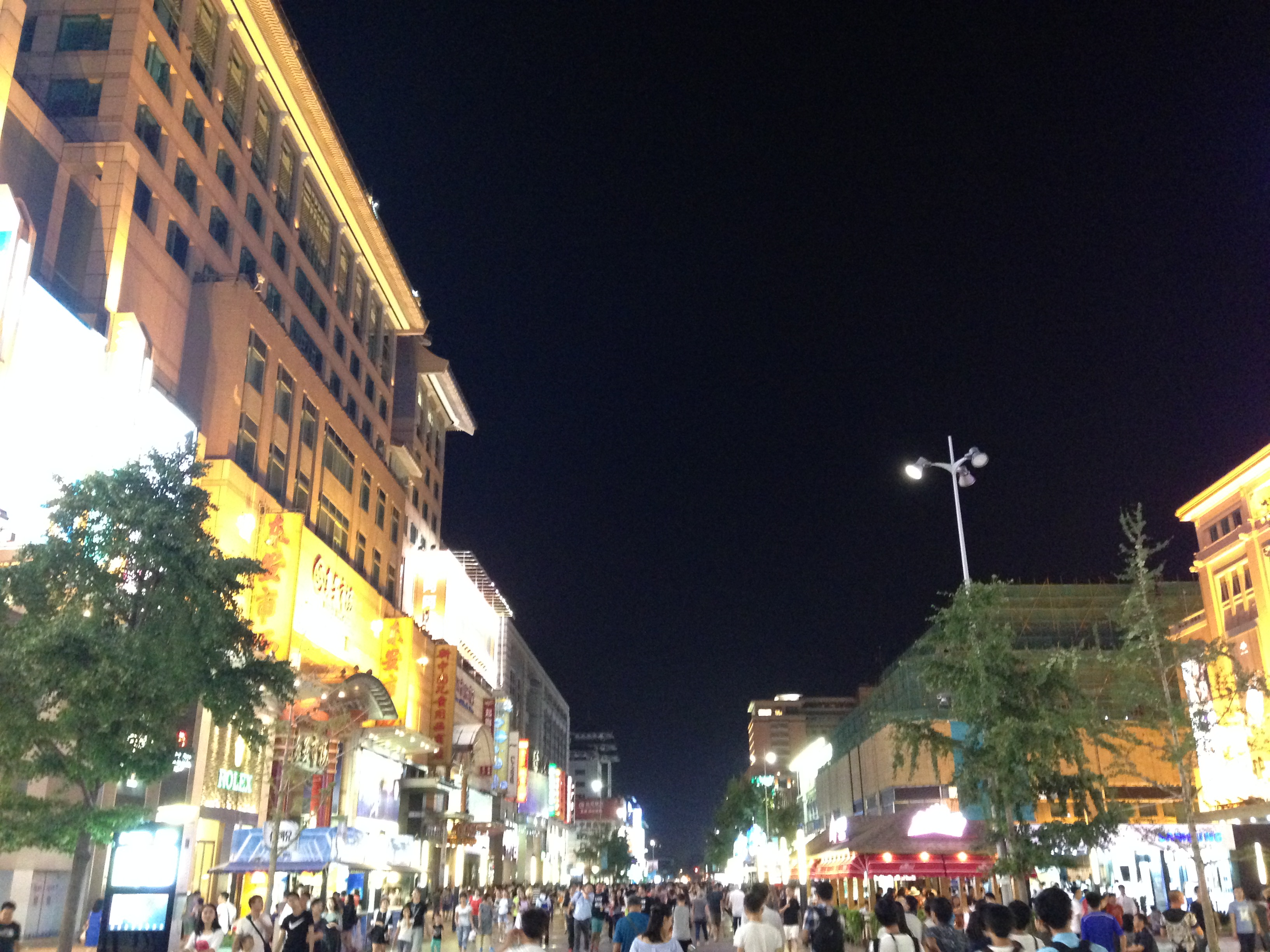 夜の王府井大街